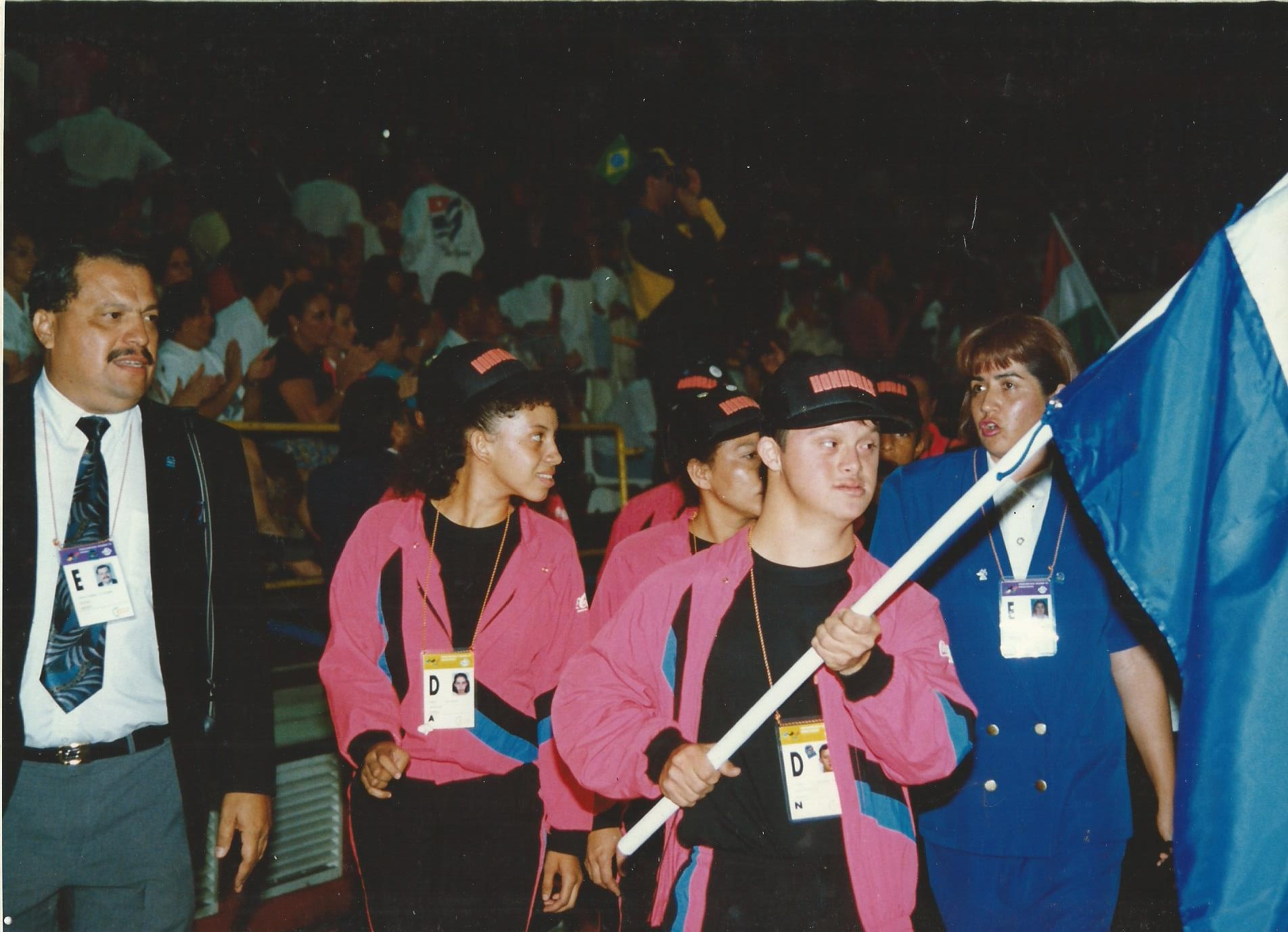 1) Sra. Edil Guillermina Soleno, Presidenta del Comité Paralímpico Hondureño. 2) Eduardo Pineda Cano, atleta de natación 3) Ana Karina Uclés, atleta de atletismo 4) Sr. German Zuniga, representante del Comité Olímpico Hondureño